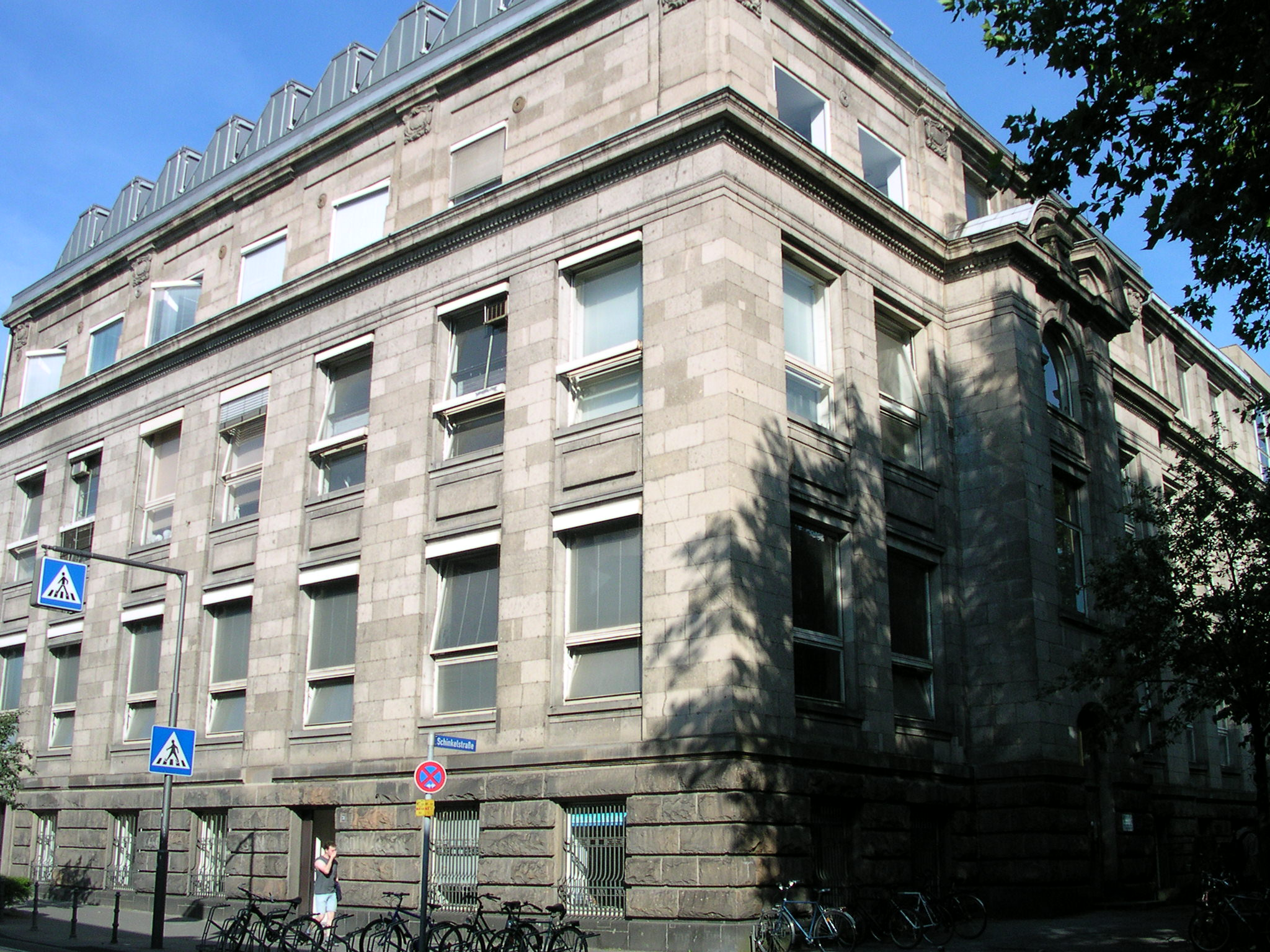 Aachen, Schinkelstraße, Ecke Templergraben; Reiff-Museum nach Franz Reiff (1835-1902), am 5. November 1908 eröffnet, heute Architekturfakultät der RWTH Aachen